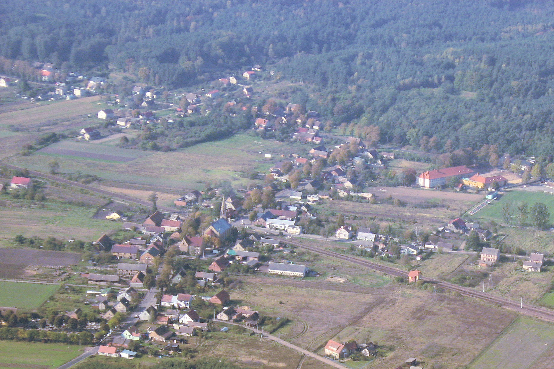 Stare Kurowo, powiat strzelecko-drezdenecki, Poland